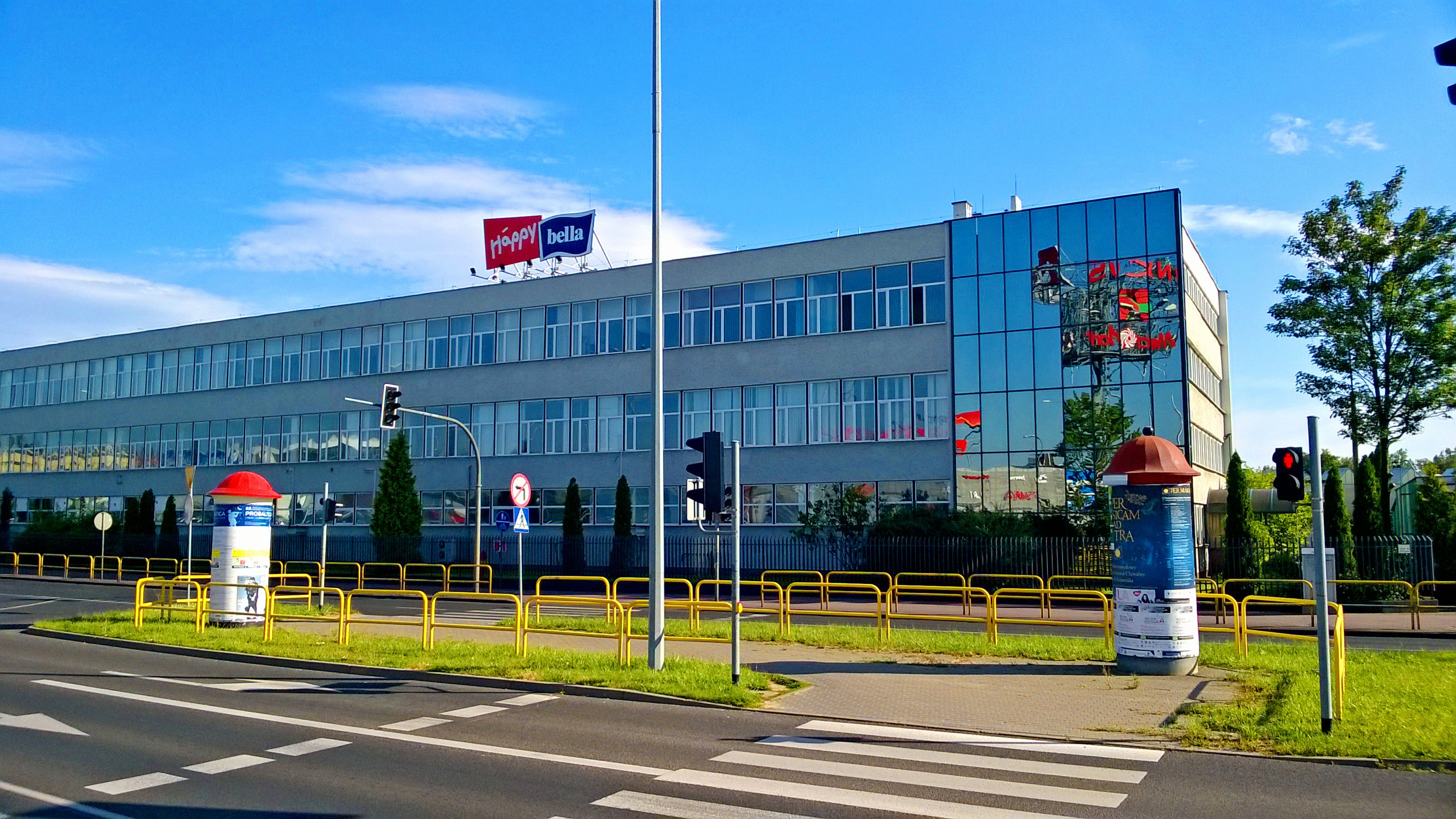 Toruńskie Zakłady Materiałów Opatrunkowych22